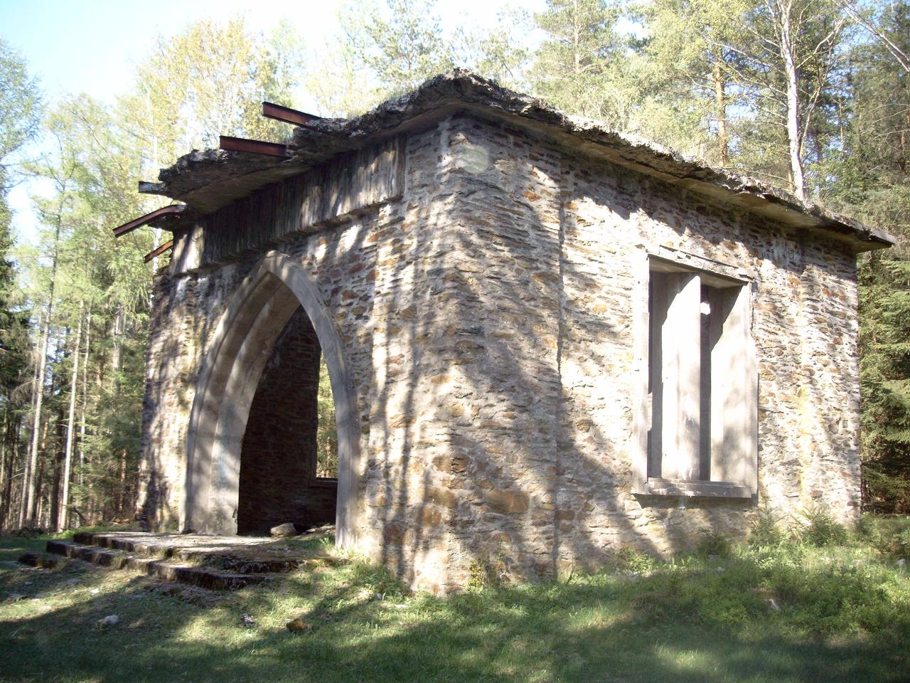 Die Turmruine auf dem Quittelsberg